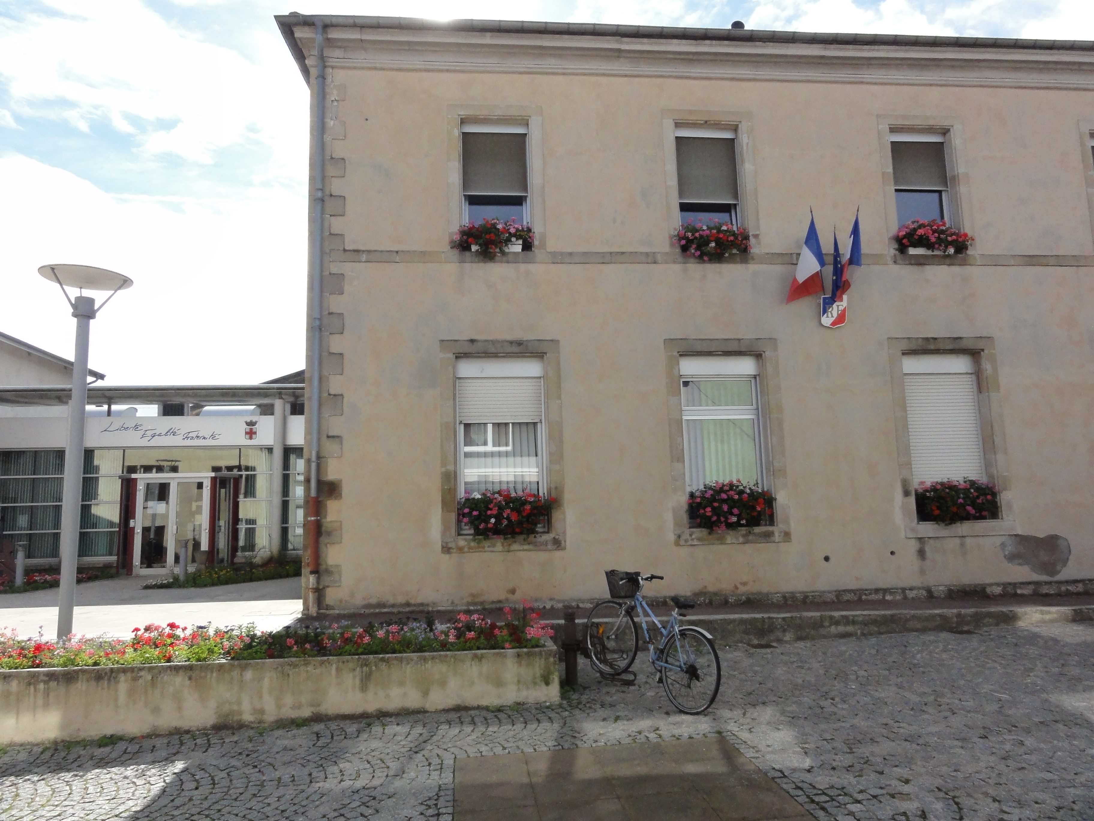 Blainville-sur-l'Eau (M-et-M) mairie